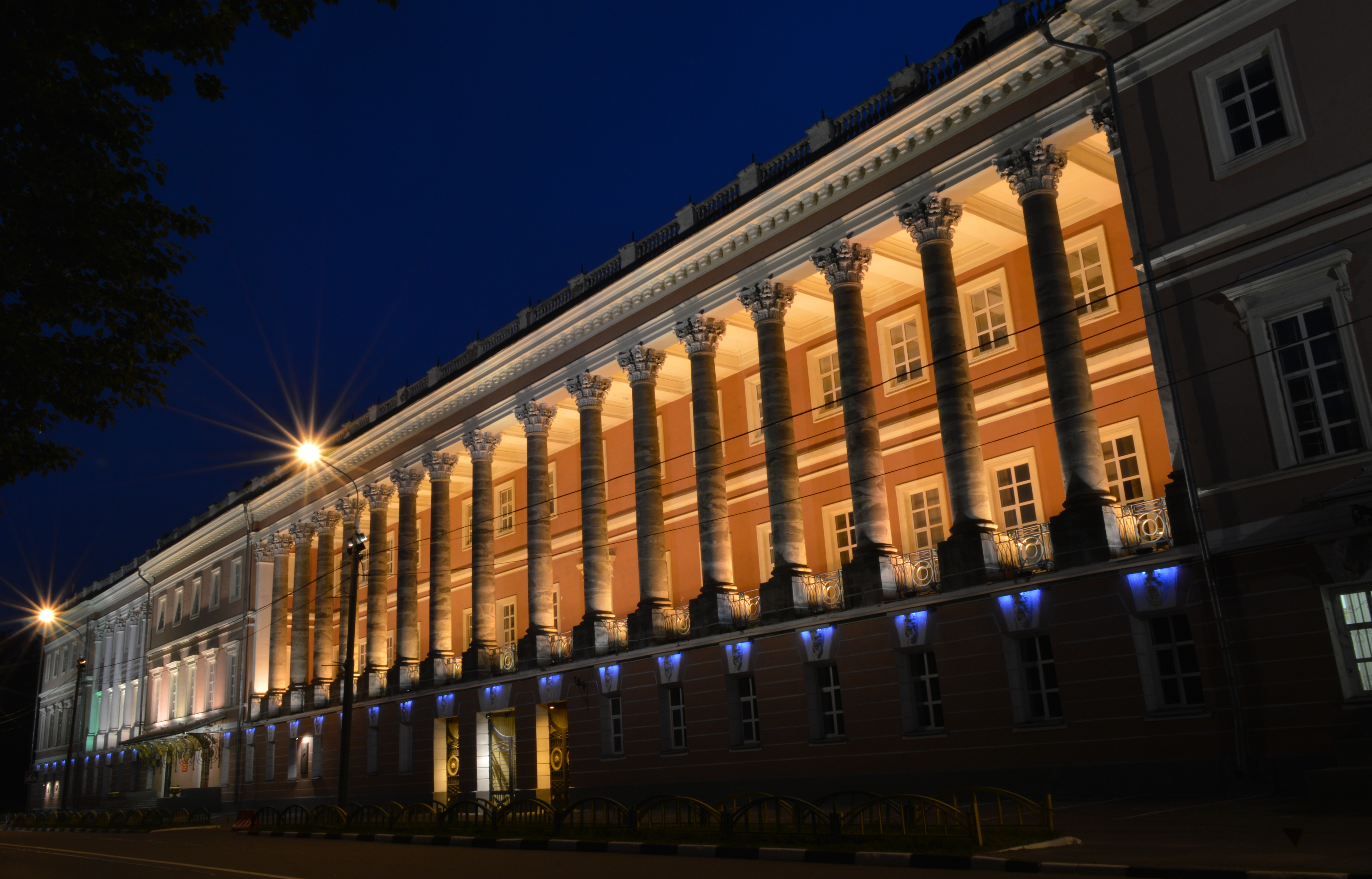 Екатерининский дворец